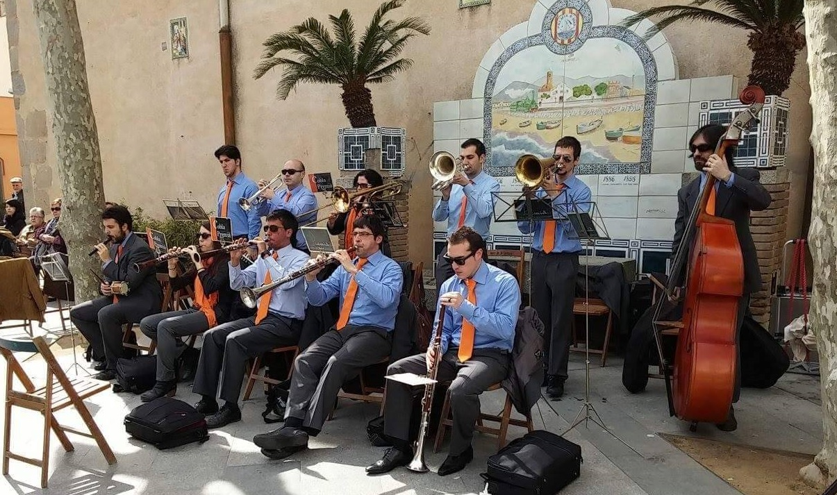 La Cobla en una actuació a la Premià de Mar (2015)